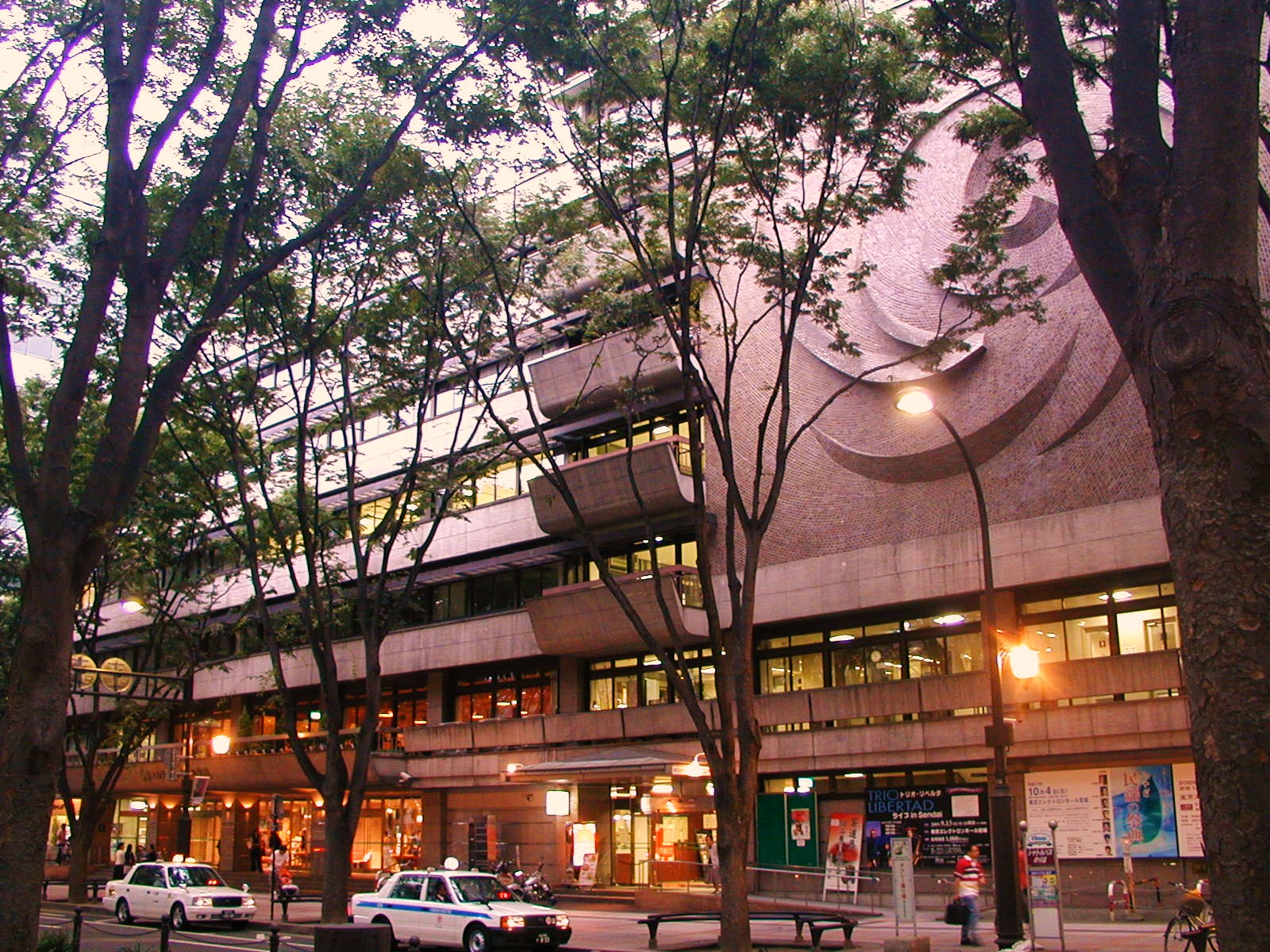 定禅寺通の中央分離帯グリーンベルトから見た宮城県民会館